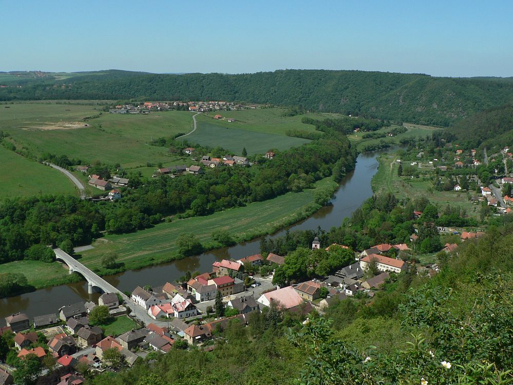 Zbecno view from Pencina lookout